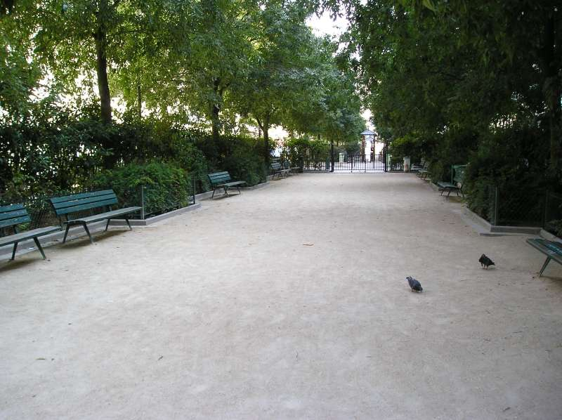 Jardin parisien dans le XIe arrondissement de Paris